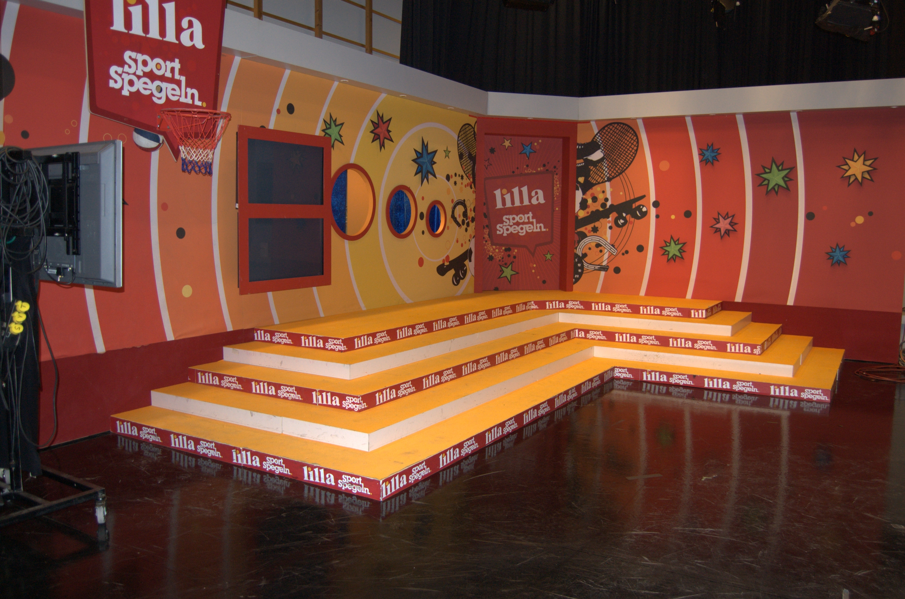 Lilla Sportspegel-studion i TV-huset i Stockholm.